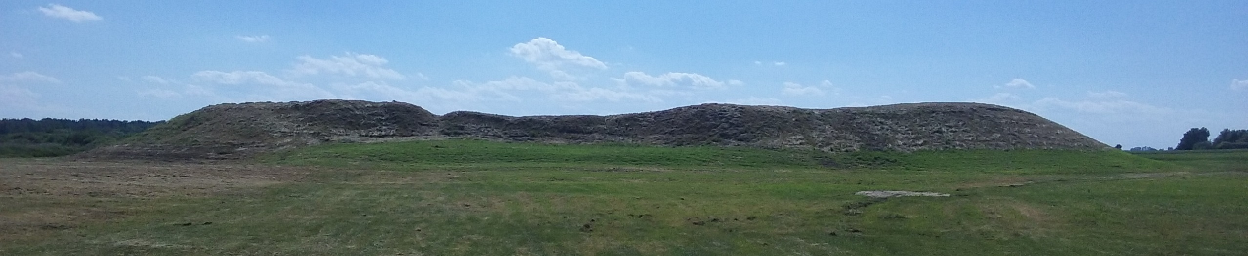 Grodzisko w Czermnie (województwo lubelskie) utożsamiane z grodem Czerwień.